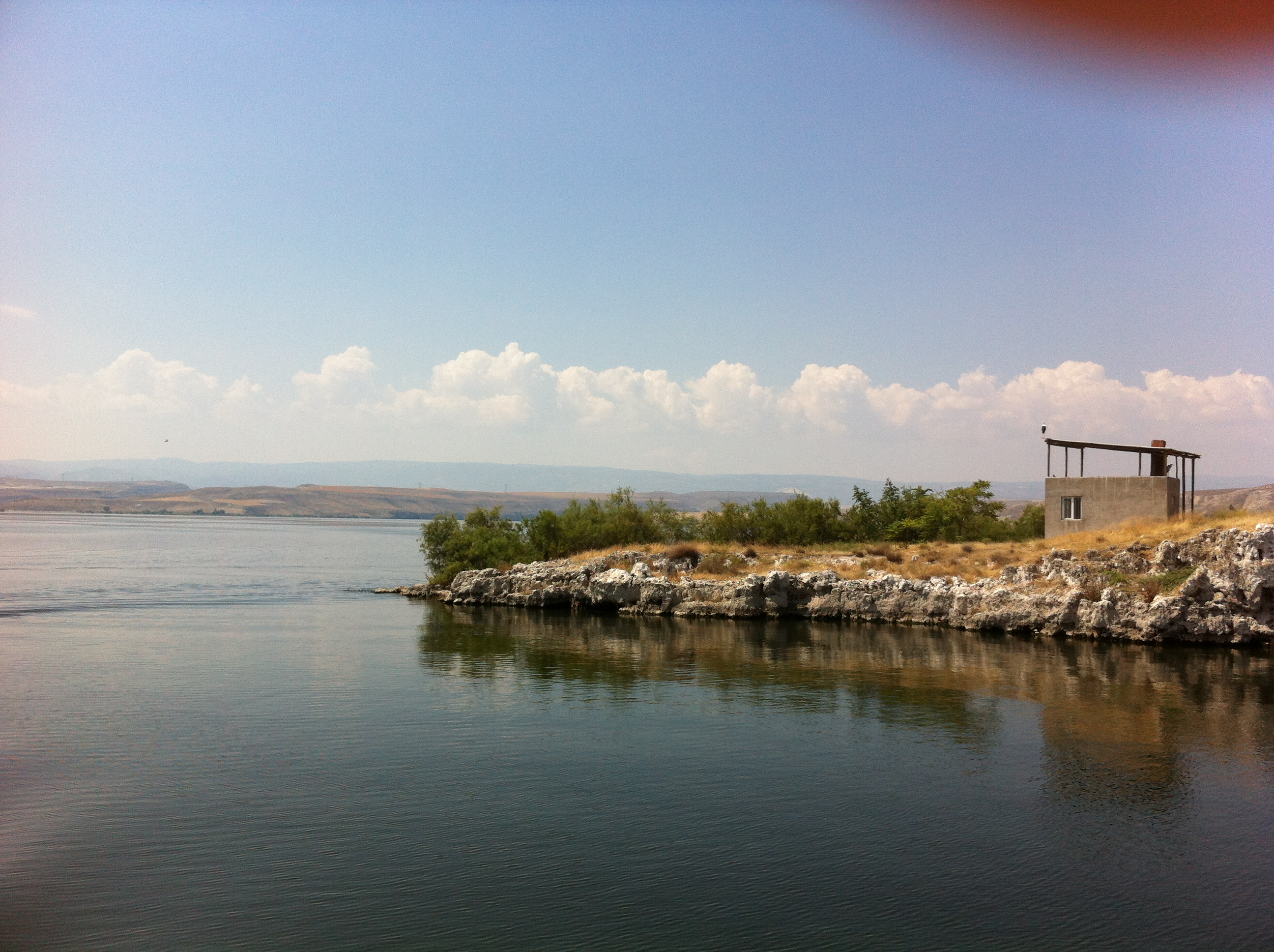 06922 Çayırhan/Nallıhan/Ankara, Turkey